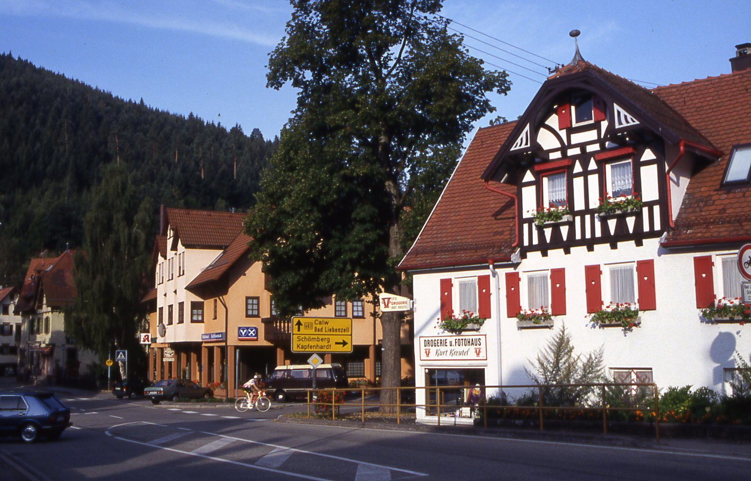 Unterreichenbach, arrondissement de Calw, croisement de la 463 vers Kapfenhardt en 1992 (Baden-Wuerttemberg).